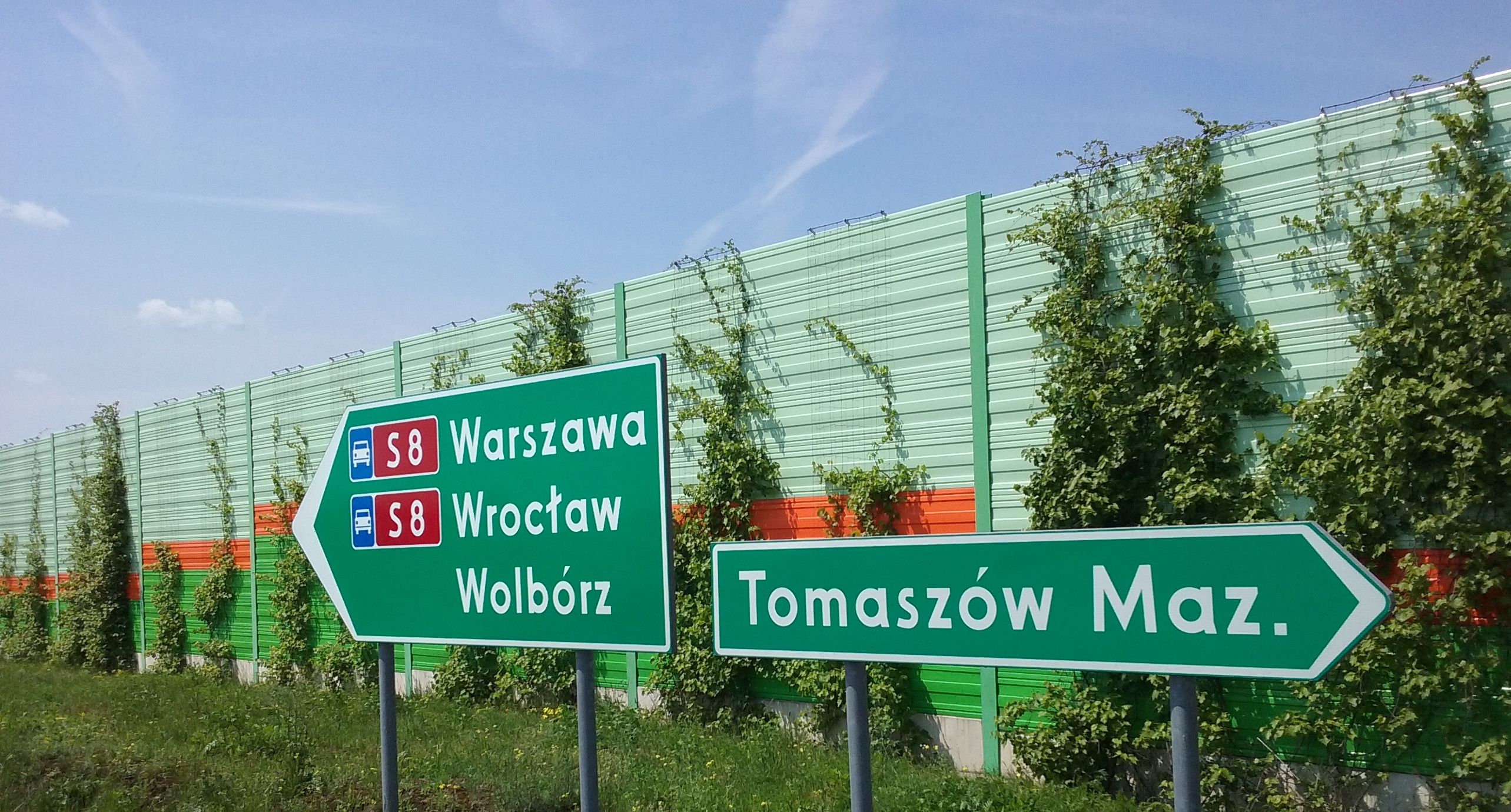 Tablice informacyjne przy jednym z trzech wjazdów do Tomaszowa - Tomaszów Mazowiecki Południe -z drogi ekspresowej S8, PL, EU, CC0